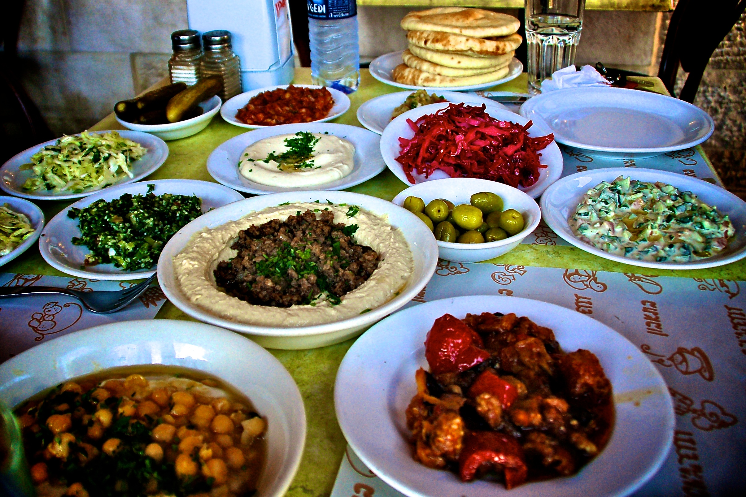 Hummus etc.